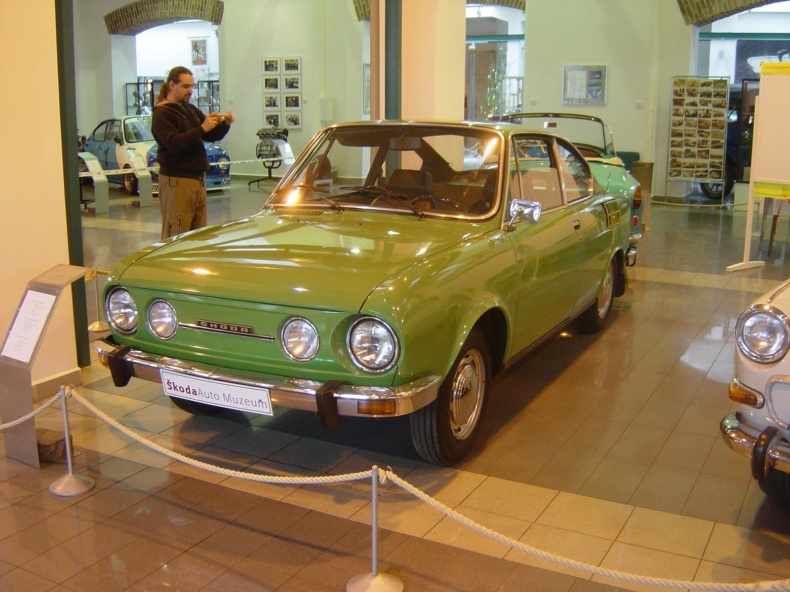 Skoda 110R